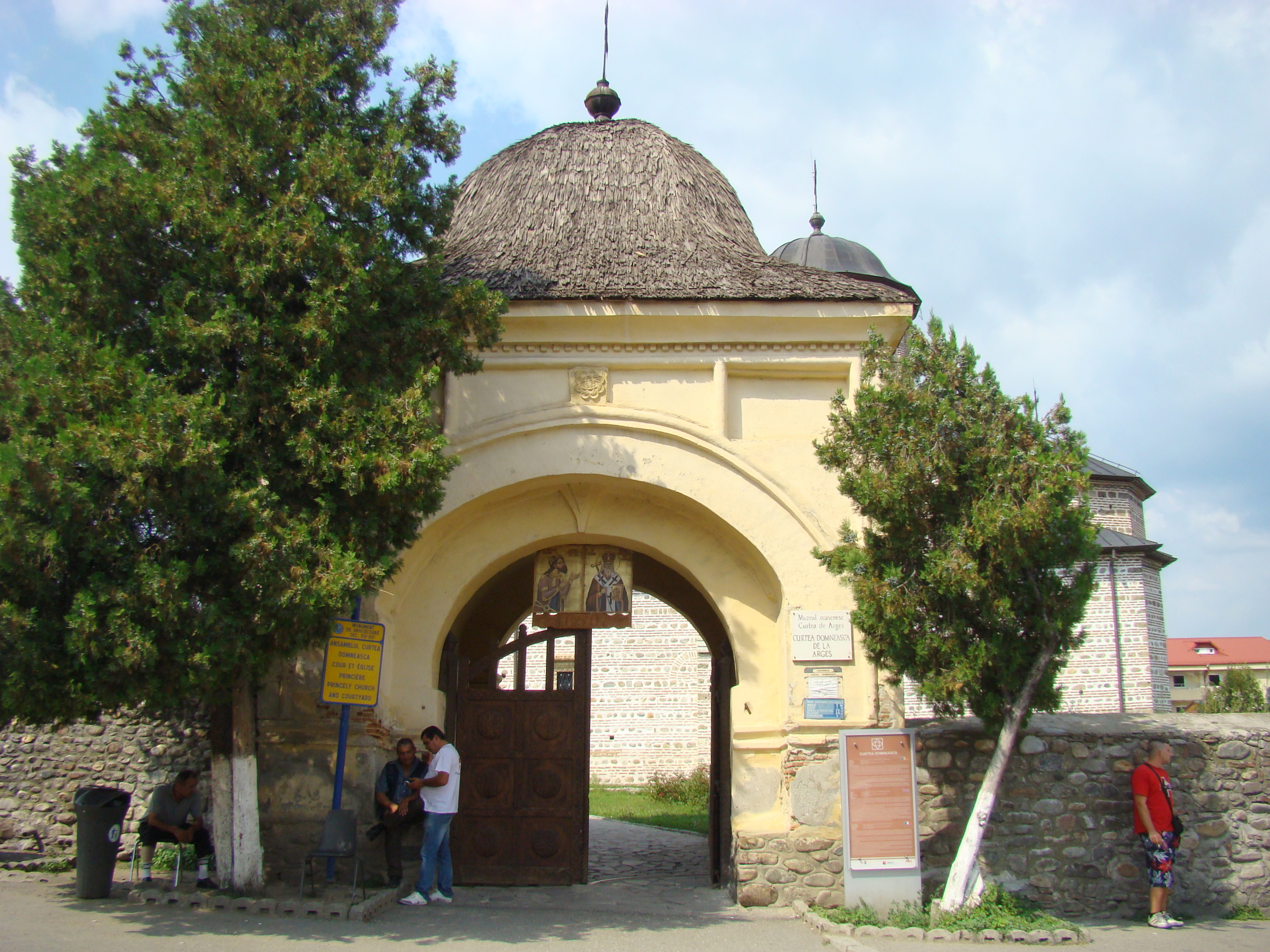 Turnul de poartă al incintei bisericii (fostă clopotniță) 04